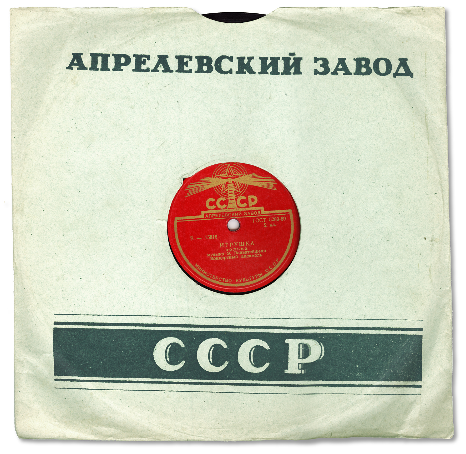 Platte der sowjetischen CCCP. Zu Gehör kommen zwei Walzer.